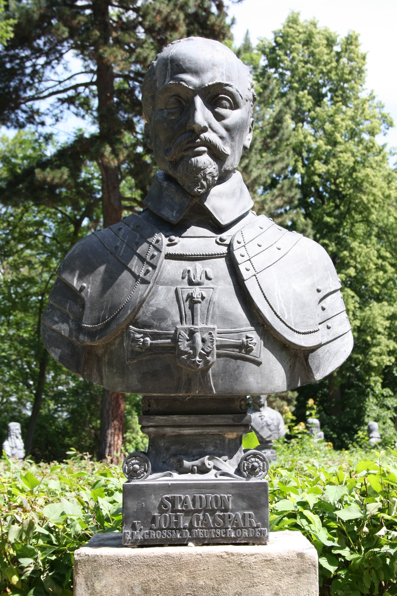 Büste in der Gedenkstätte Heldenberg (Niederösterreich)